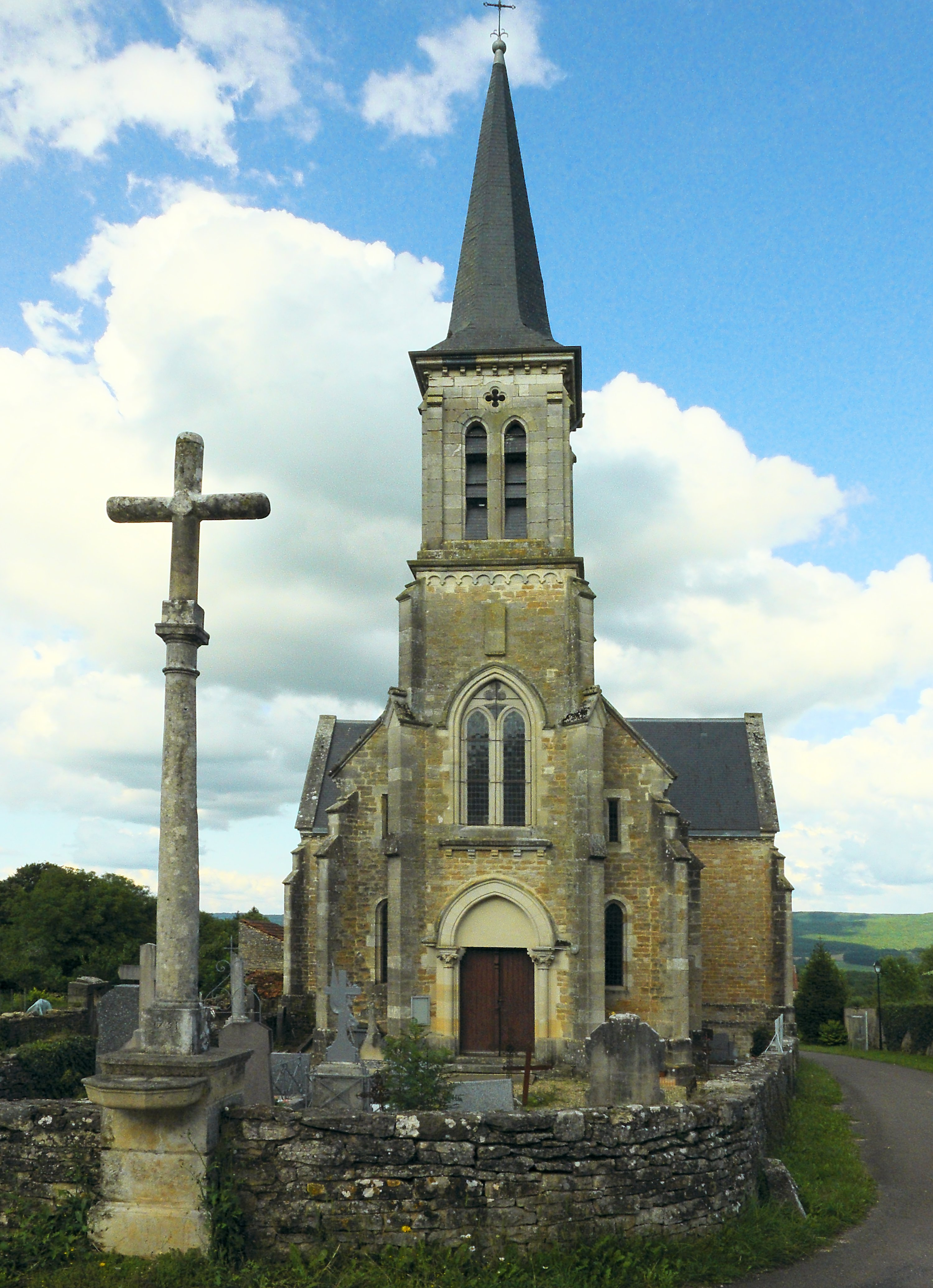 Colombier (Côte-d(Or). L'église